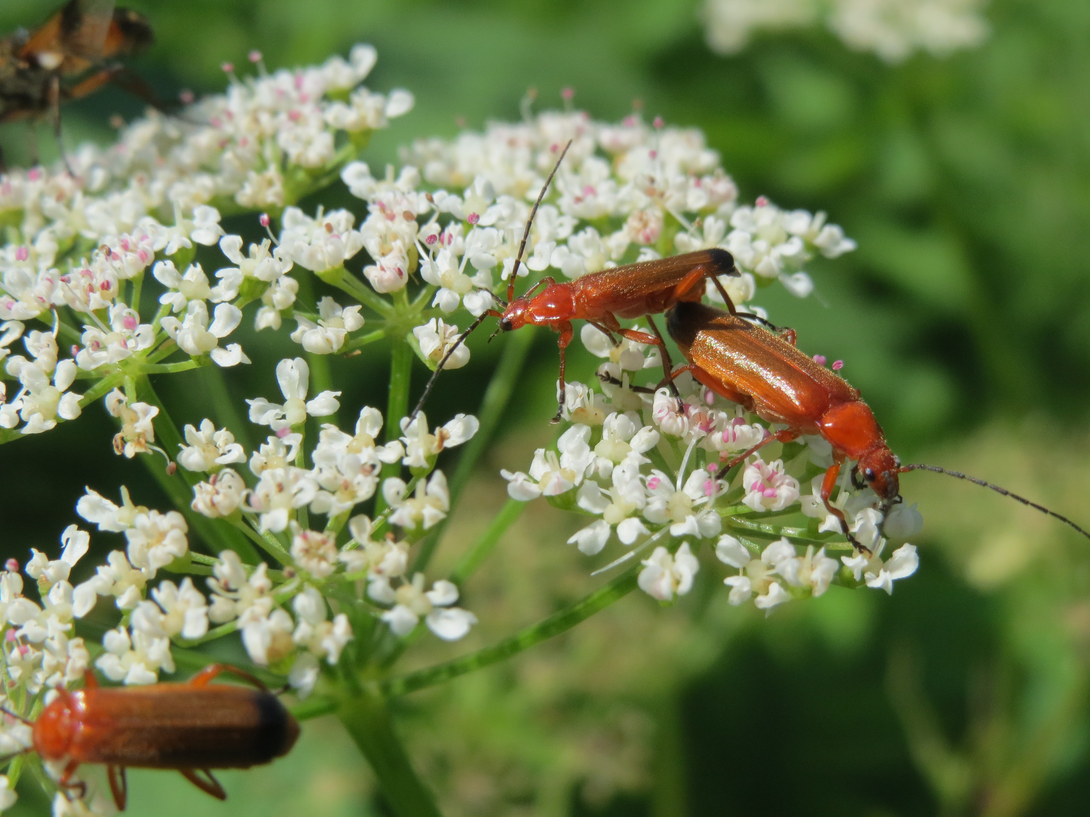 Giersch (Aegopodium podagraria) in Hockenheim